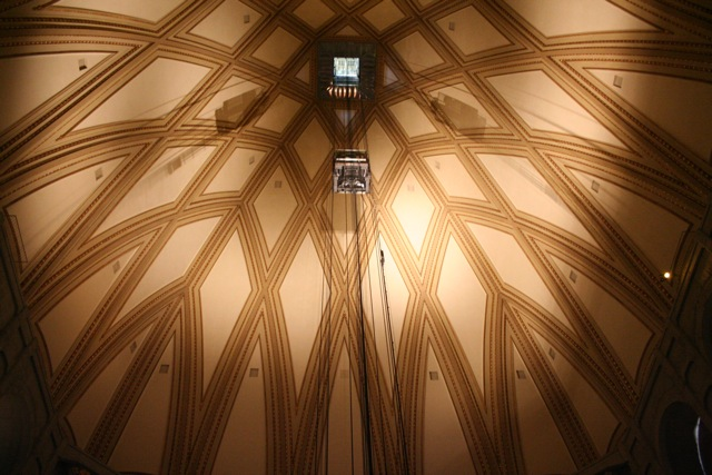 Interno della Mole Antonelliana: il nuovo ascensore panoramico Museo nazionale del Cinema in Torino - Italia.